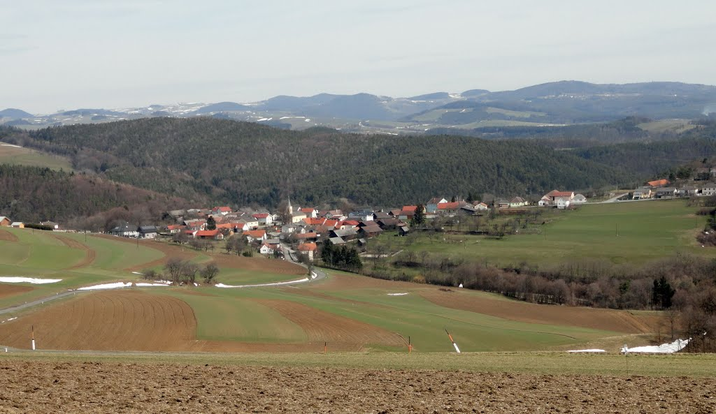 Aussicht von der Platte Richtung Lebenbrunn